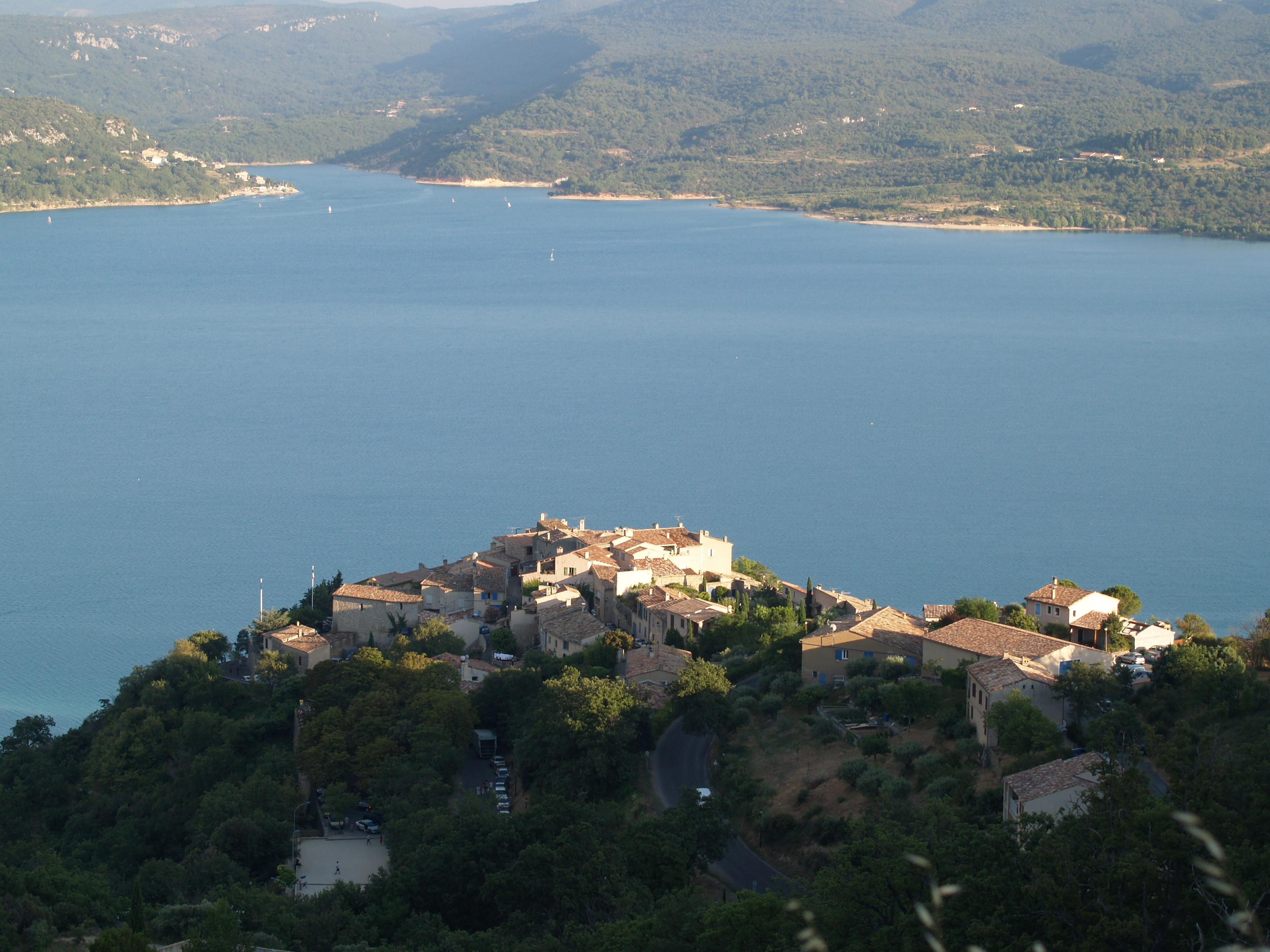 Vue générale de Sainte Croix du verdon